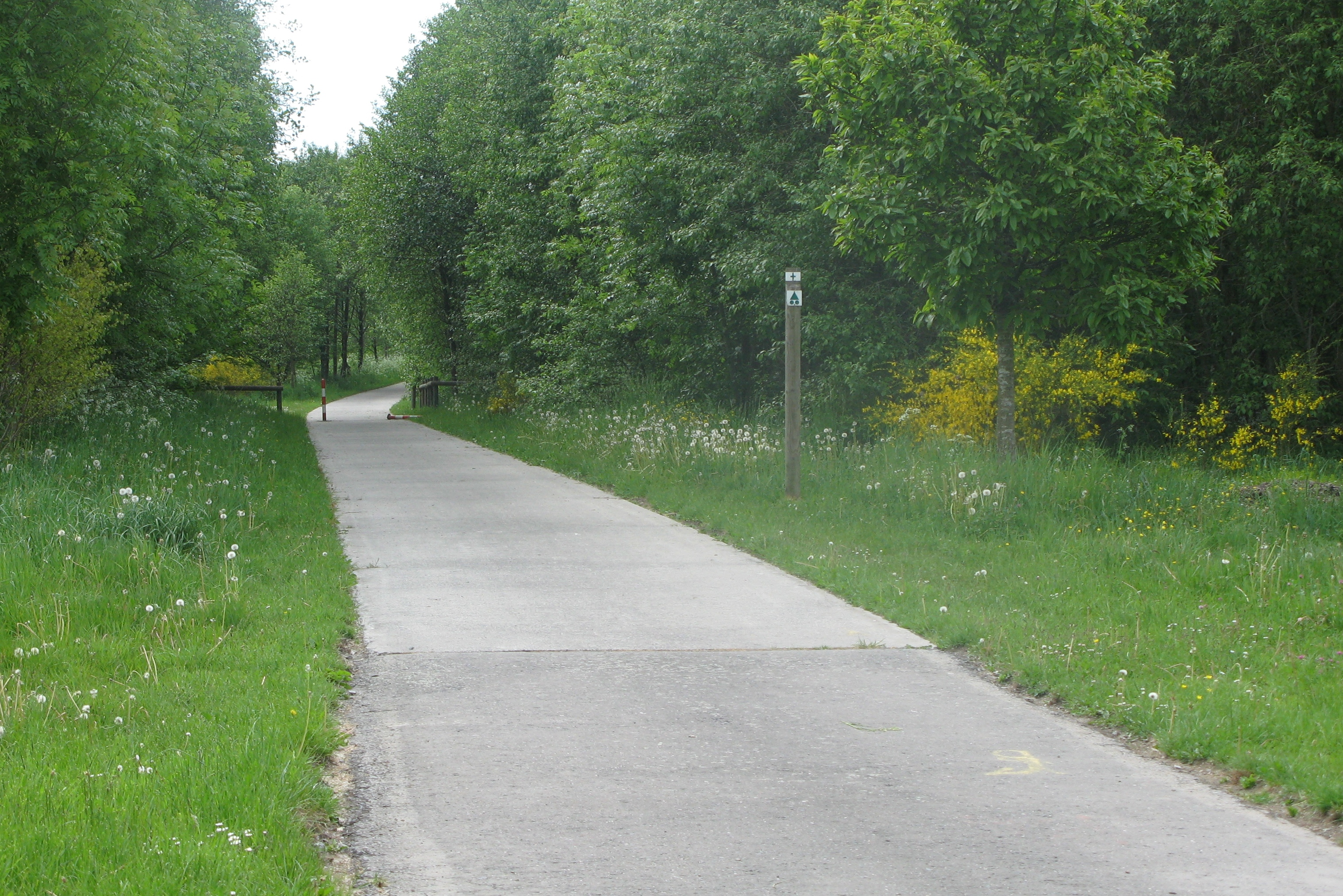 D'Vëlospiste zu Benonchamps um Tracé vun der fréiere SNCB-Linn 164. Vun der Plaz vun der Gare a Richtung Baaschtnech gekuckt. Kategorie:Eisebunnsstrecken an der Belsch